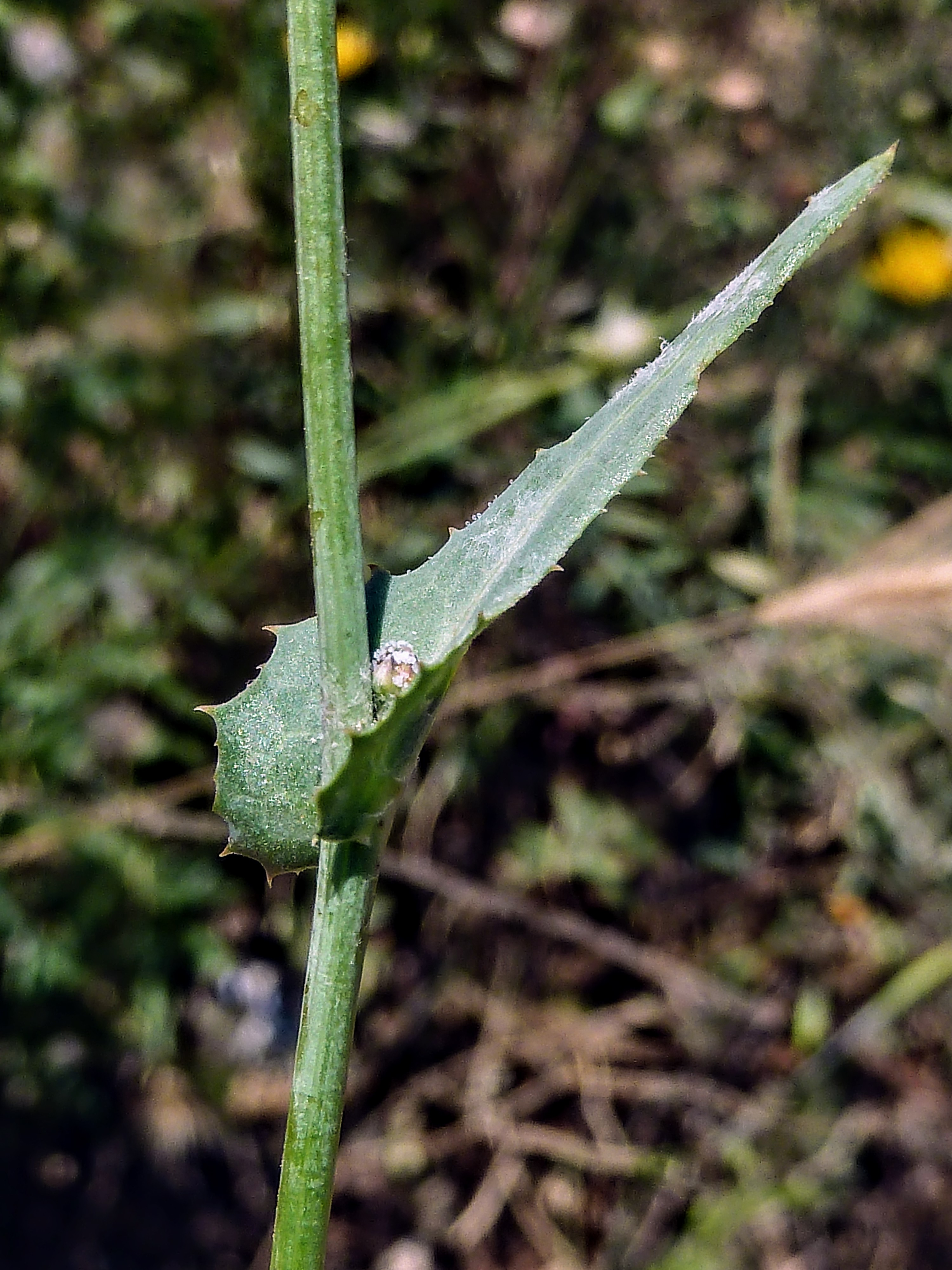 Reichardia tingitana (cosconilla, lechuguilla dulce) - Hoja caulinar, haz. - C./ Compositor Manuel Berná García, Albatera (Alicante, España).